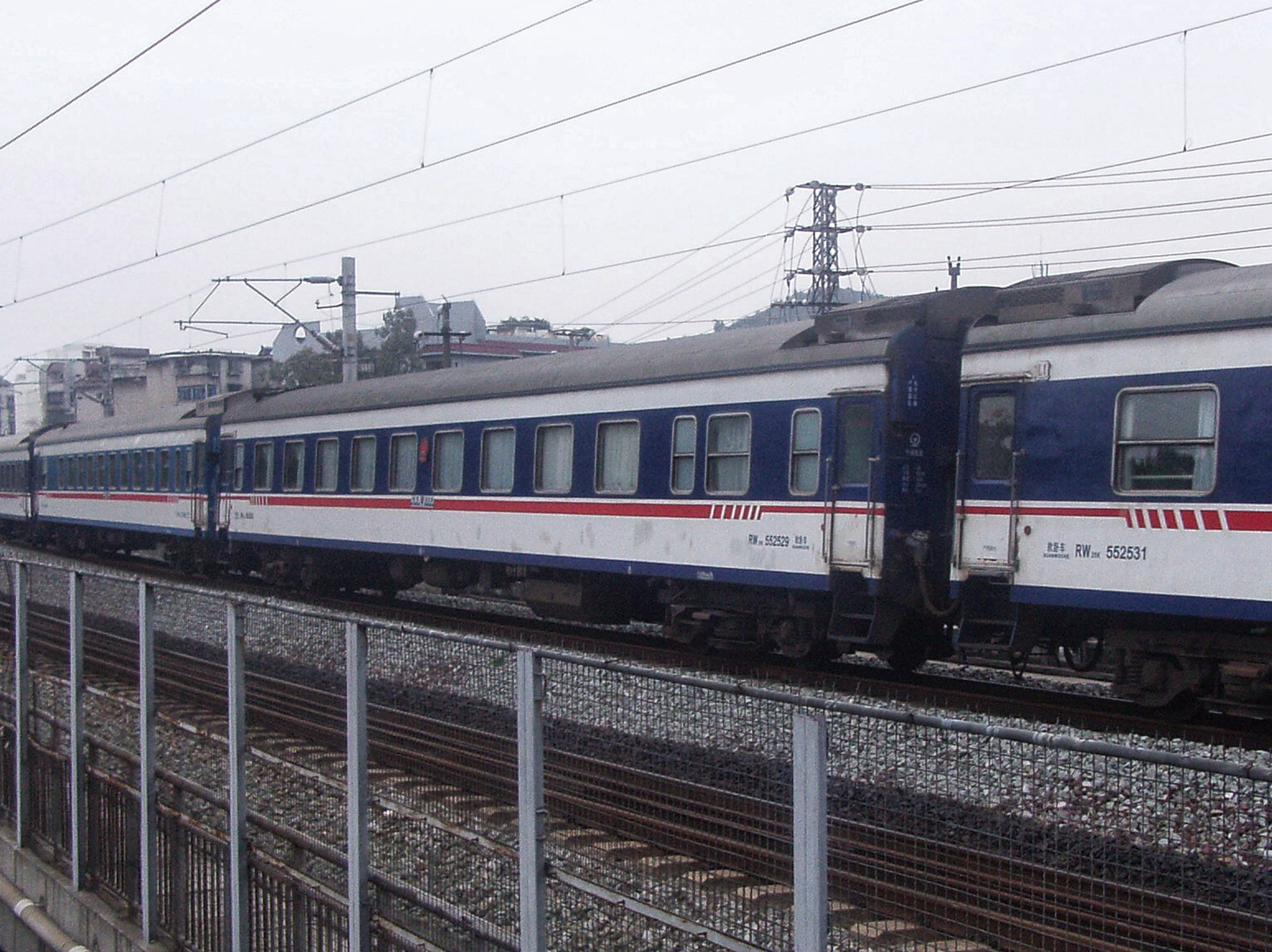 2014年12月6日发出的T6次列车是列车升级为Z5/6次列车前开出的最后一班由同登站始发的国际列车。